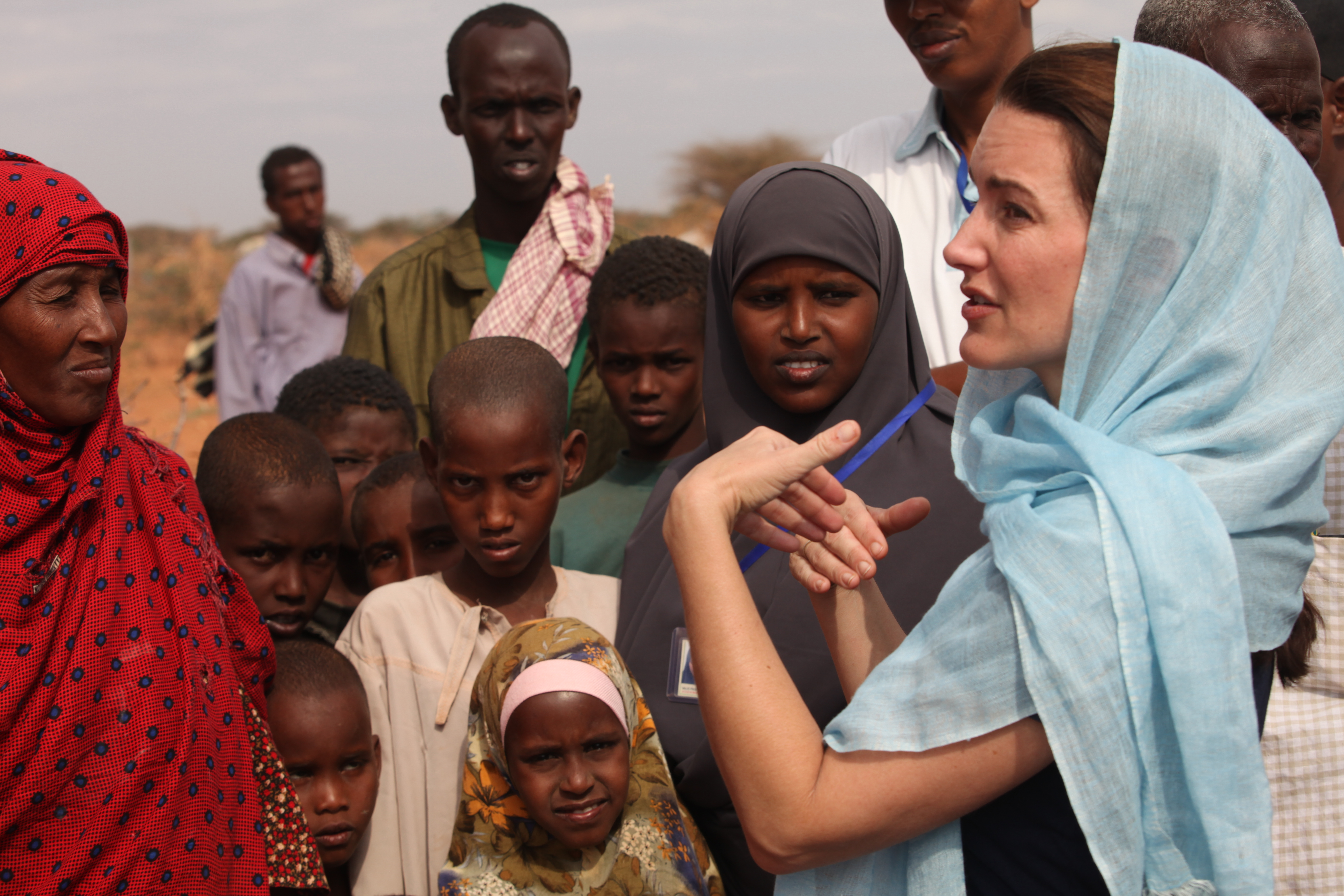 Oxfam Ambassador Kristin Davis visits Dadaab refugee camp